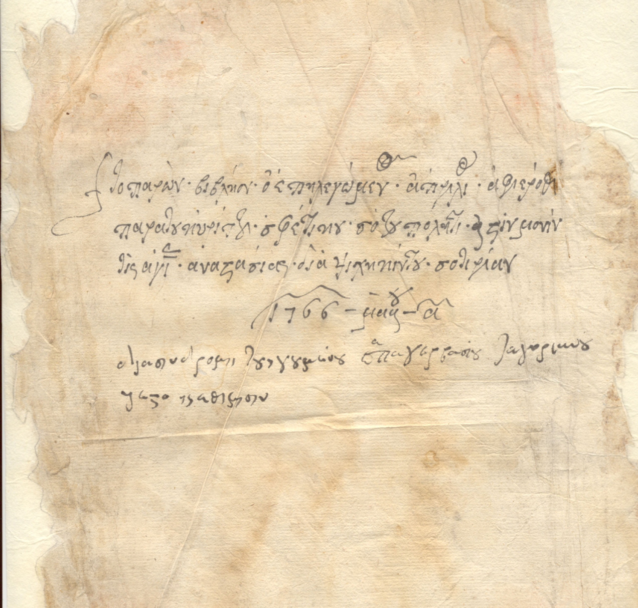 Най-старият архивен документ във фонда на Териториална дирекция Държавни архиви гр. Бургас, 1766 г. Отнася се за имотното състояние на манастира “Света Анастасия”